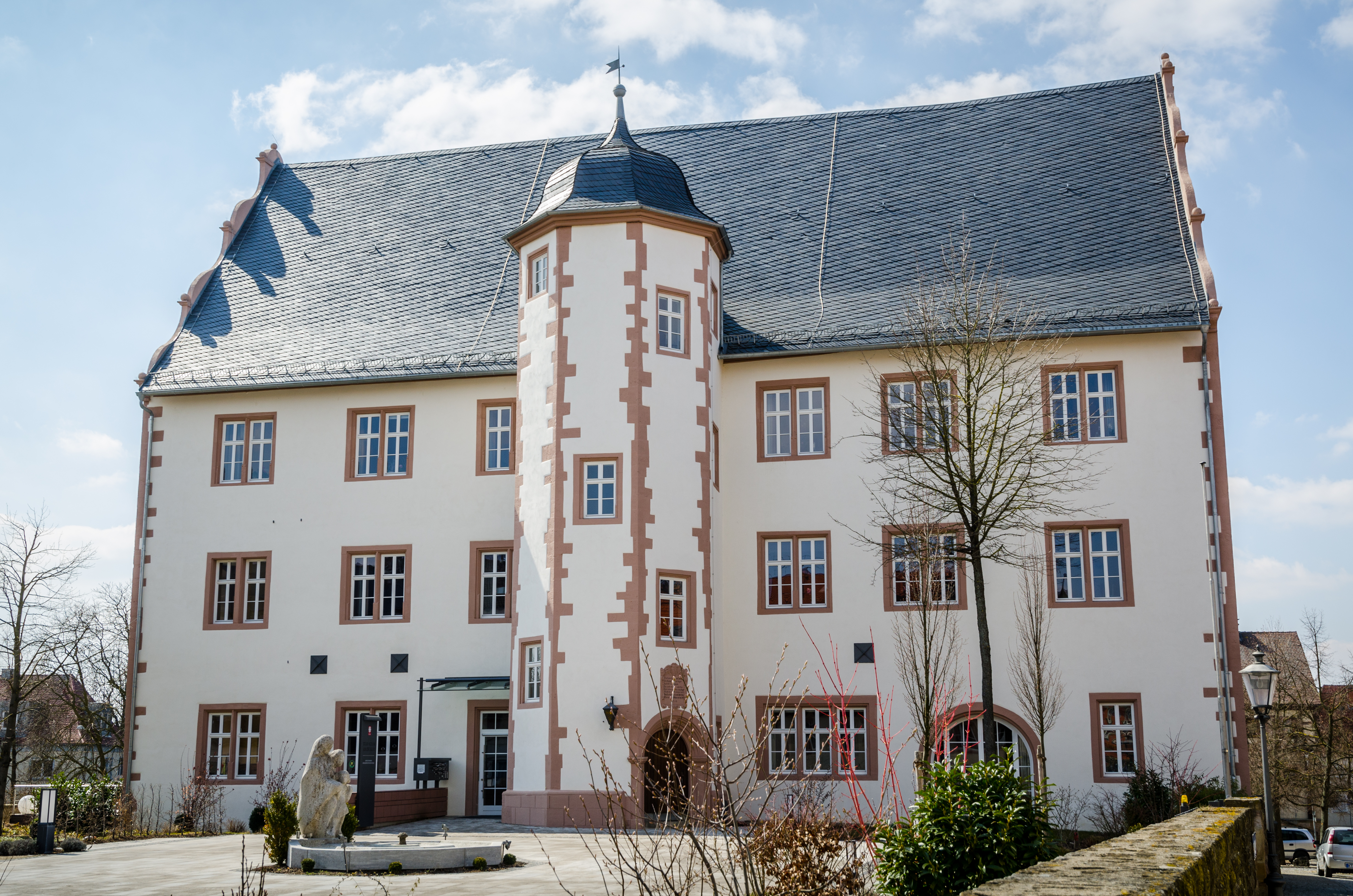 Gerolzhofen, Bürgermeister-Weigand-Straße 5